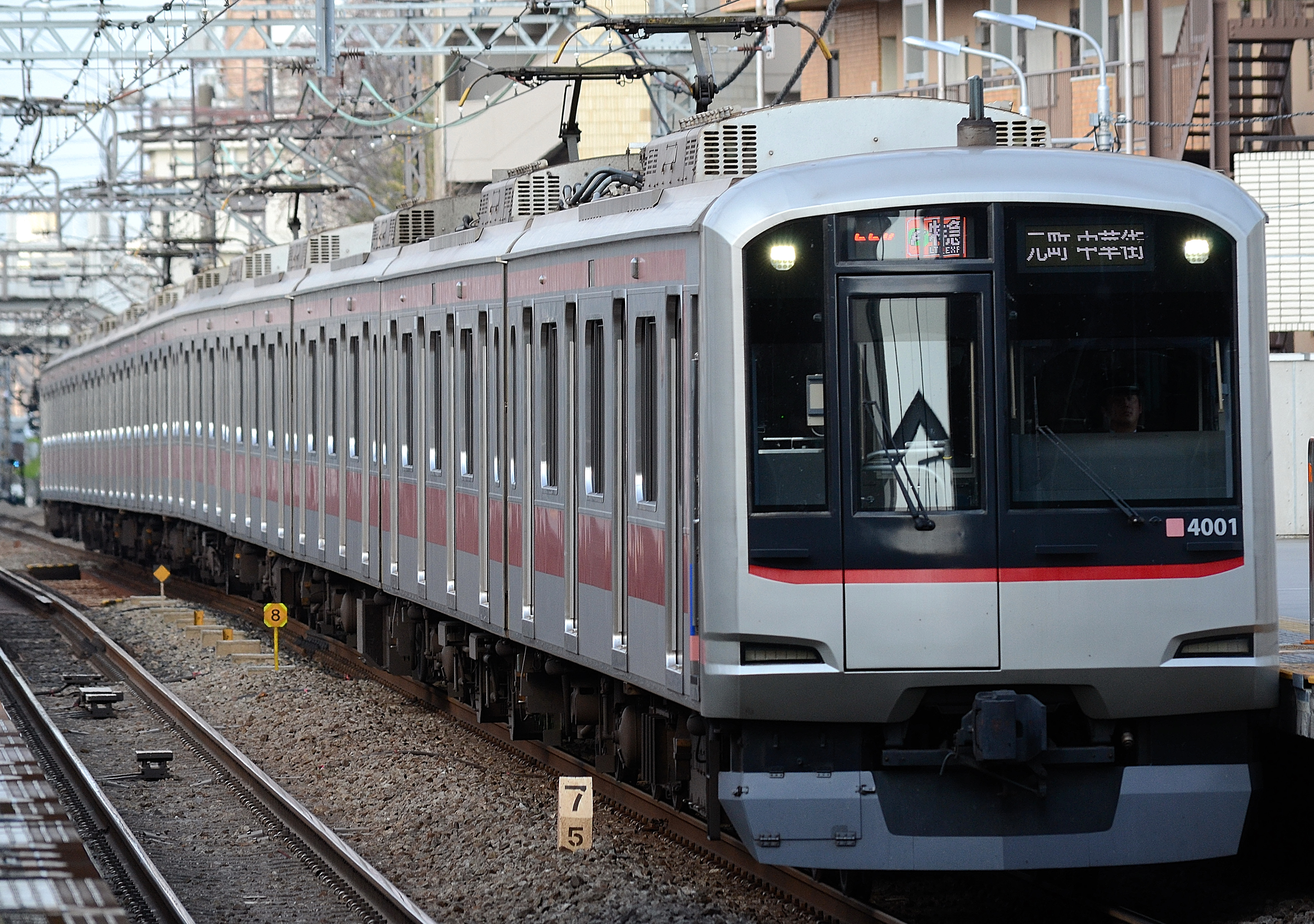 東横線、都立大学駅を通過する東急5050系4000番台によるF特急｢元町・中華街」行き